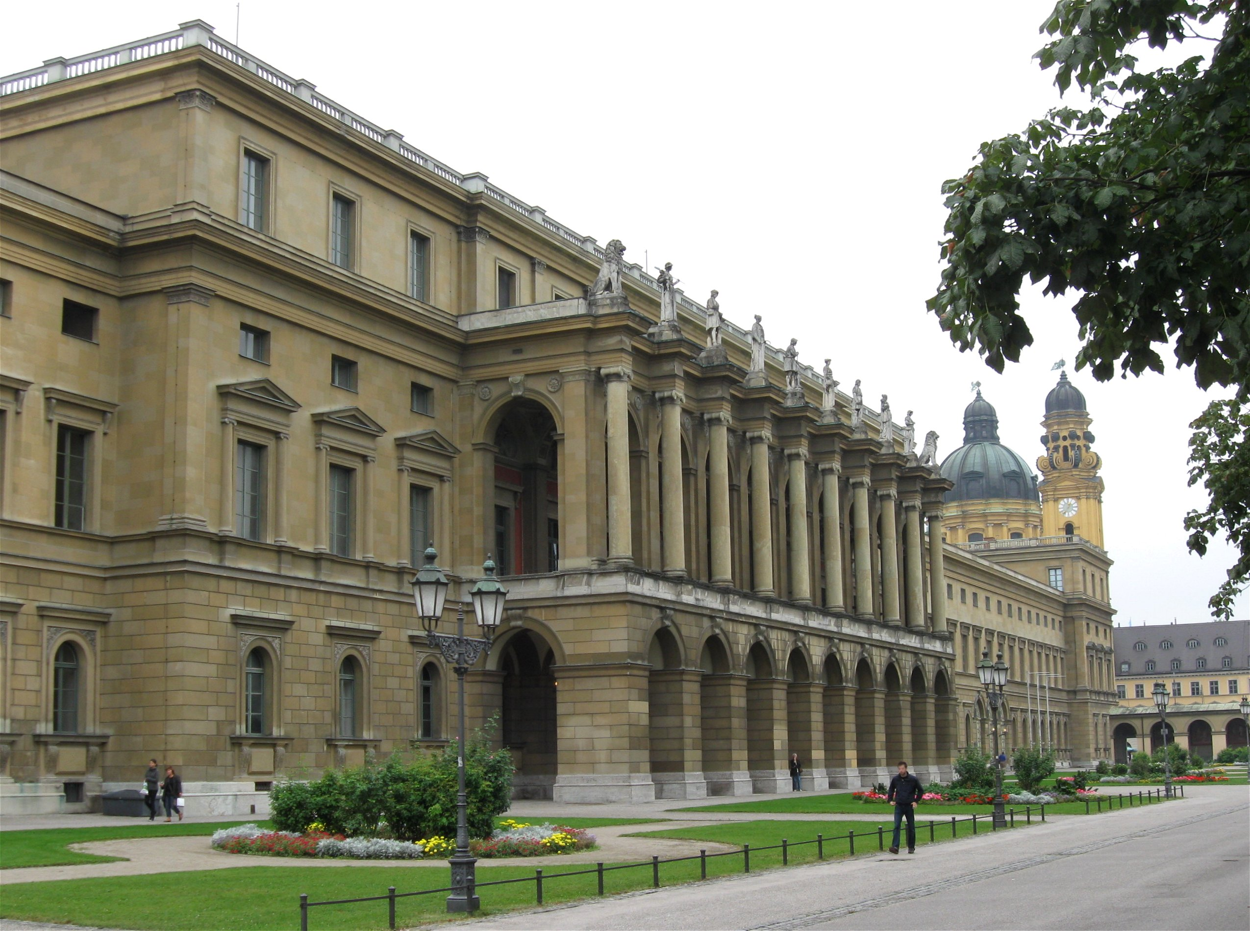 Residenz München, Eingang zum Herkulessaal